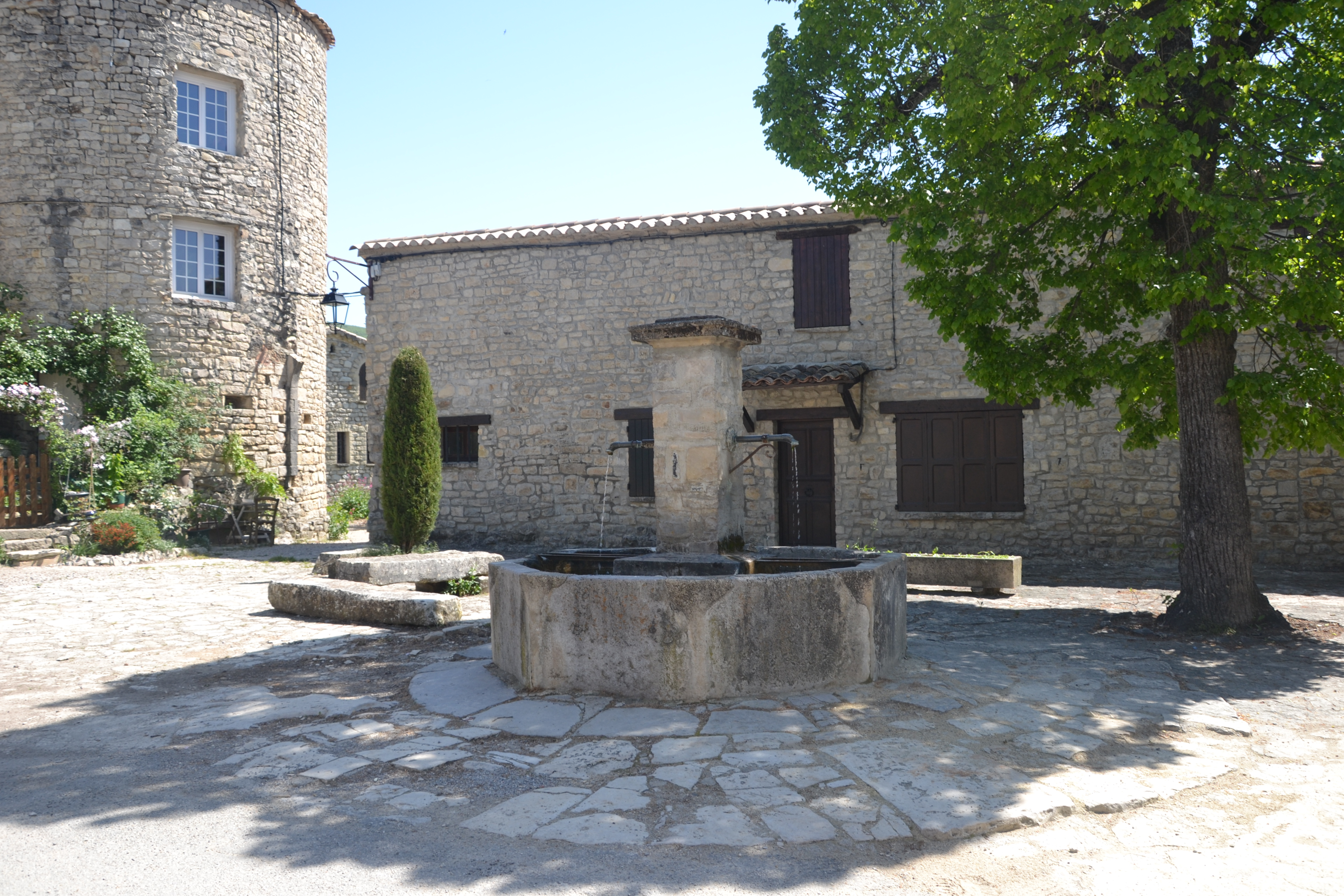 fontaine à Saint Auban sur l'Ouvèze